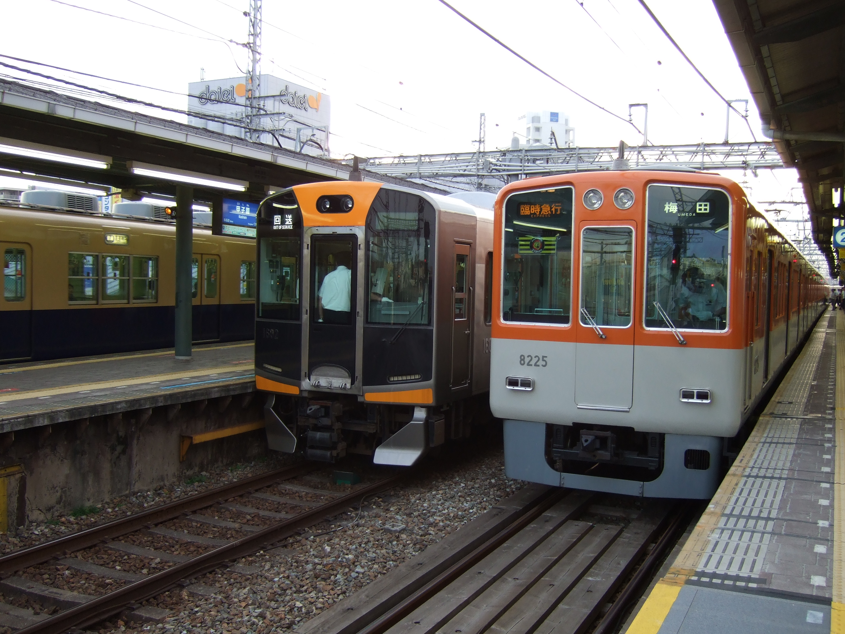 阪神本線の臨時急行梅田ゆき。主に甲子園球場での土日祝デーゲーム夕方に運転される。甲子園駅で発車を待つ。